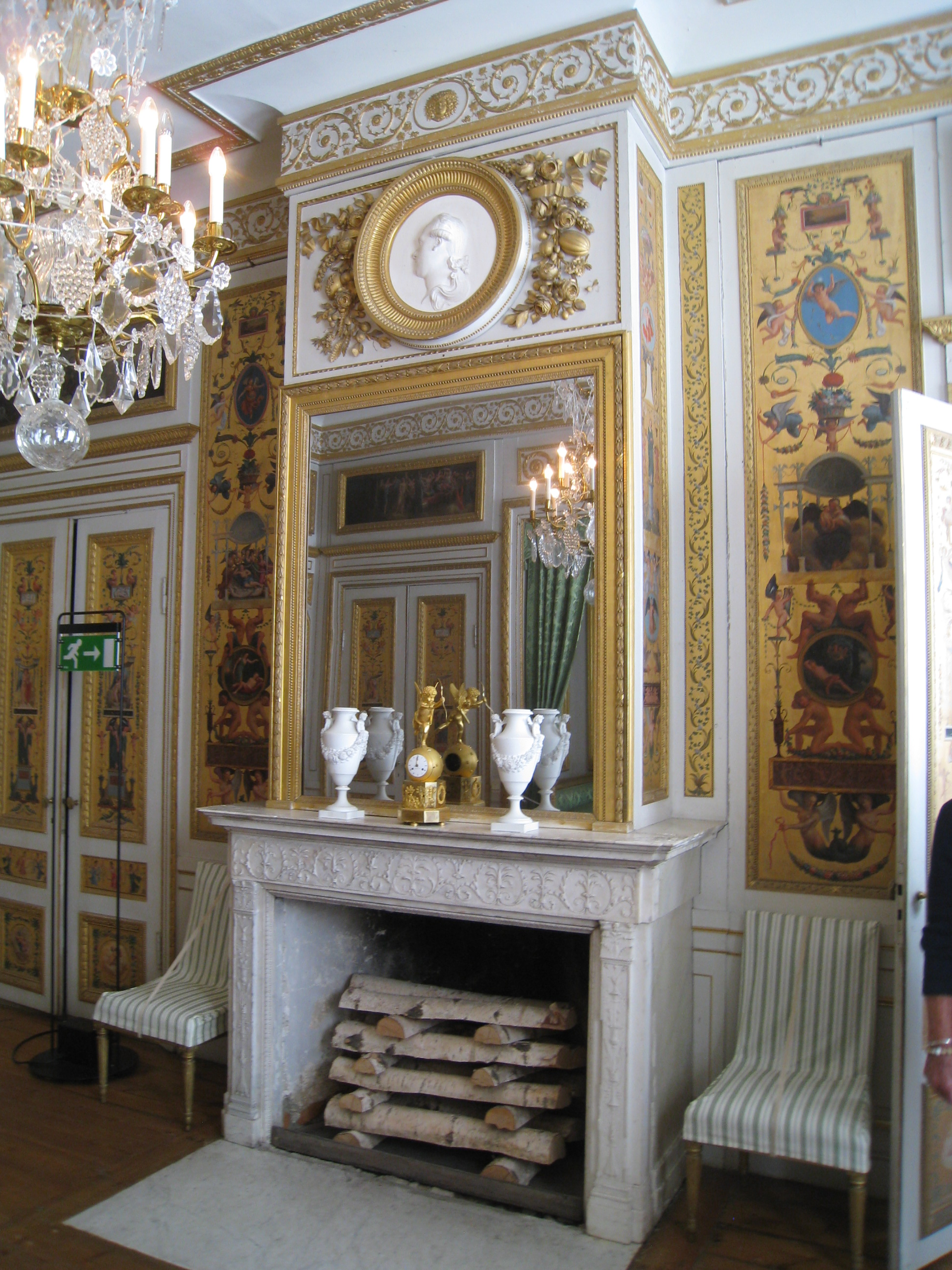 Tullgarns slott, interiör i lilla sängkammaren, Hölö, Södertälje kommun, Södermanland. Hertigen Fredrik Adolf av Östergötlands sängkammare nyinreddes omkring 1800 av Anders Hultgren (1763-1838). Han målade väggarna med färgrika arabesker mot guldgrund. Över spegeln sitter Sergels porträttmedaljong av hertigen.